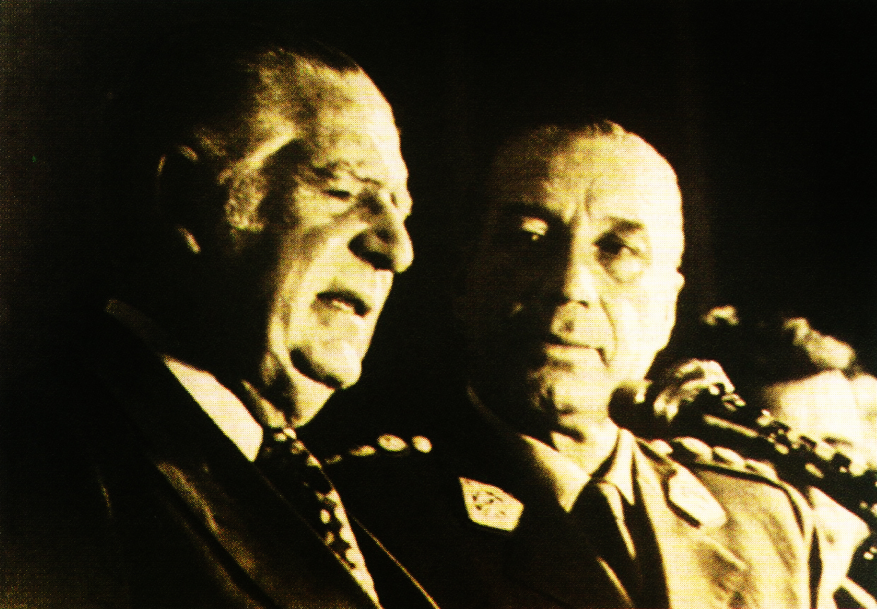 El Retorno a la Democracia en el Perú 1980, con el presidente del Perú: Francisco Morales Bermúdez y el presidente elegido por segunda vez: Fernando Belaunde Terry